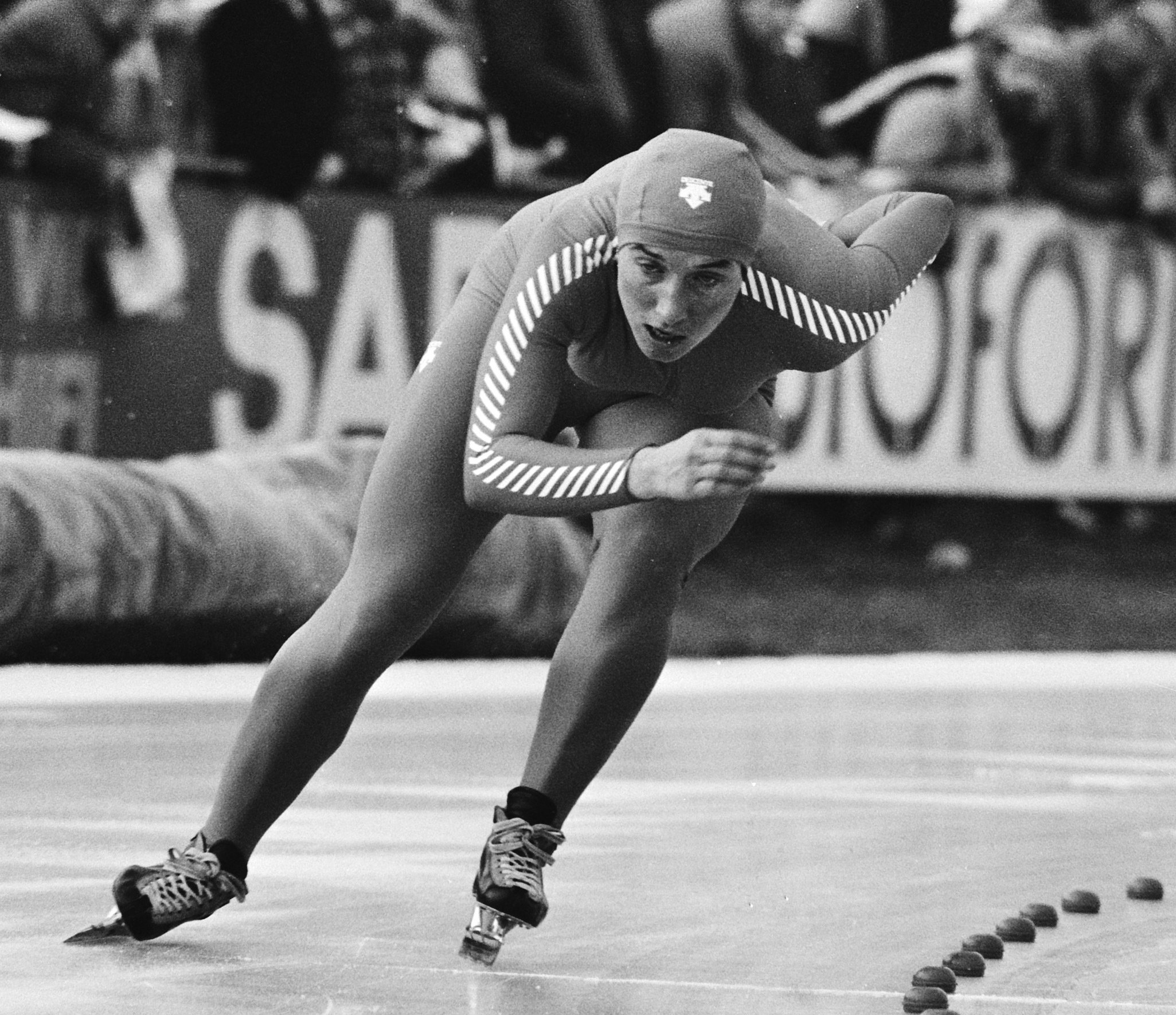 EK schaatsen vrouwen in Heerenveen; Petruseva in actie.